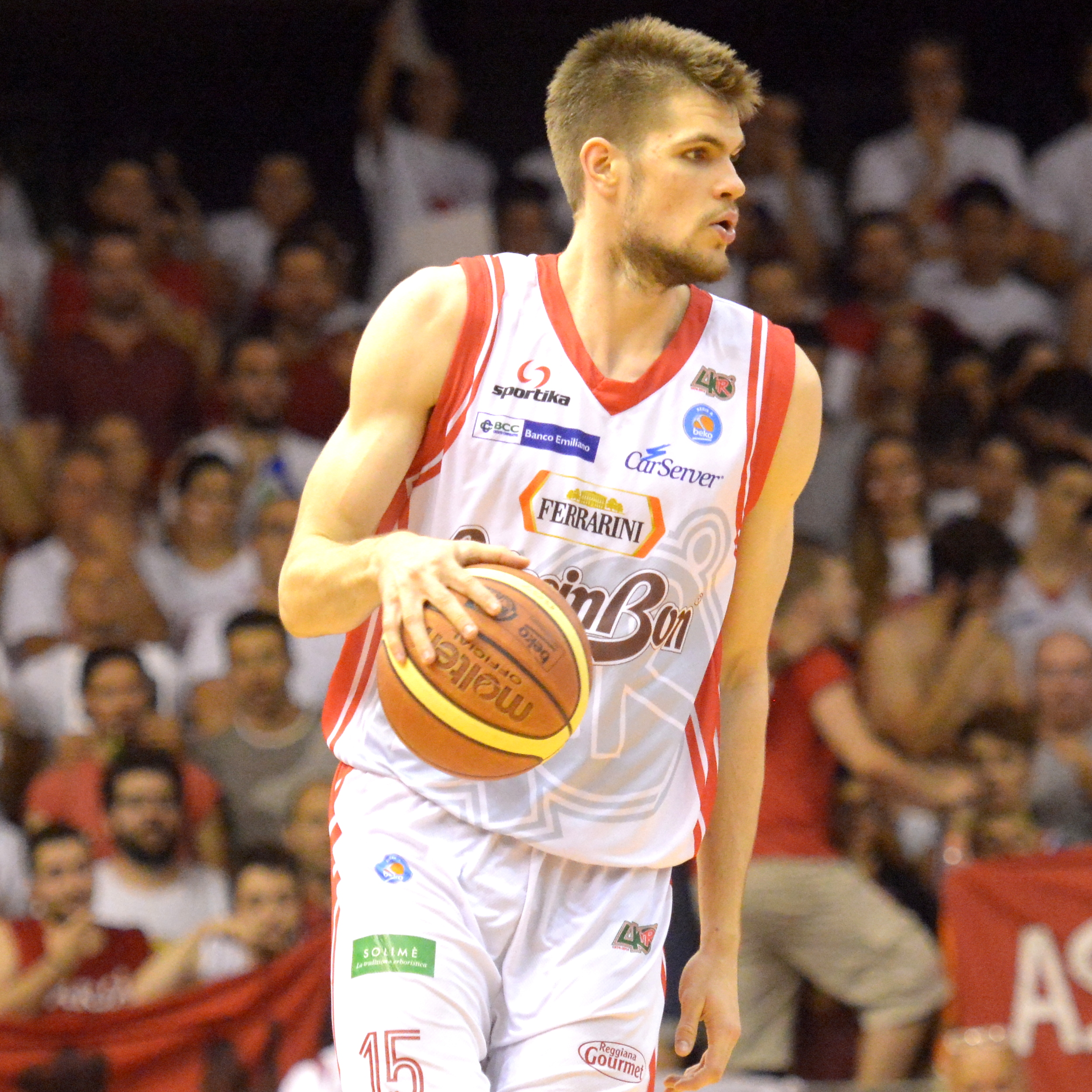 Ojars Silins in azione con la maglia di Reggio Emilia in gara 7 di finale play-off contro Sassari